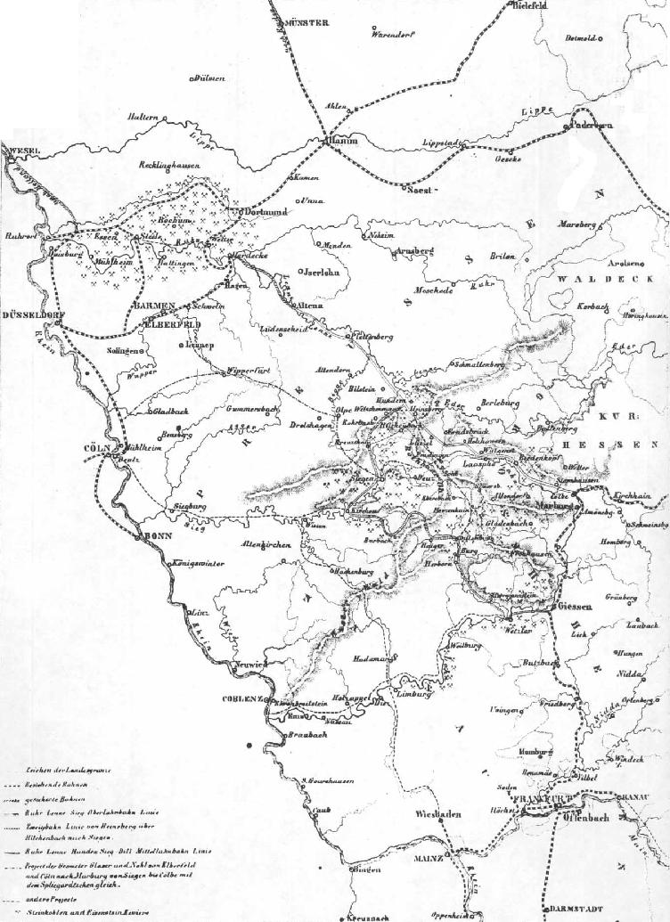 Project einer Ruhr-Lenne-(Sieg-)Oberlahn-Eisenbahn on german Wikisource